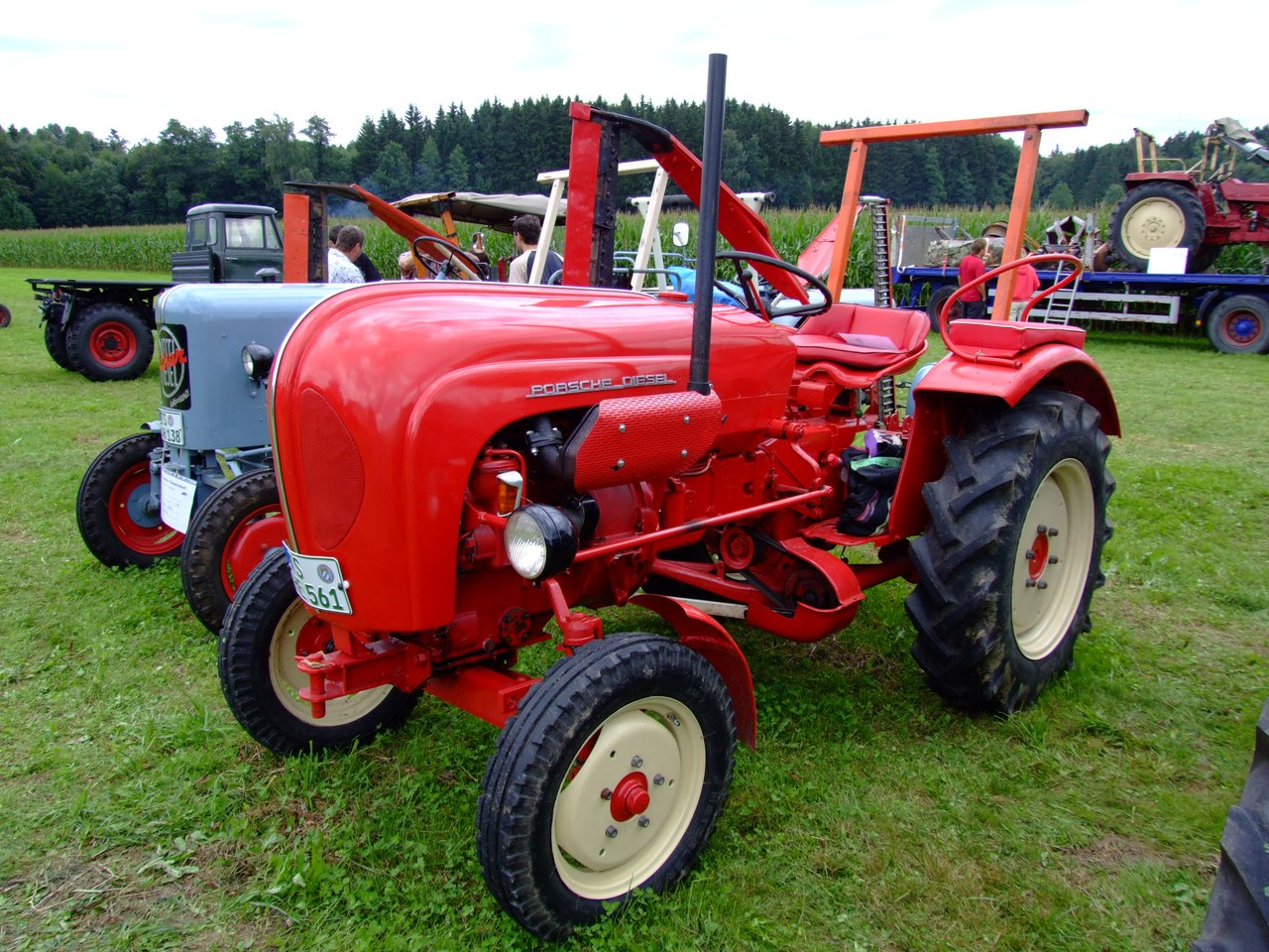 Porsche-Diesel Standard 217 mit 20 PS, Baujahr 1960